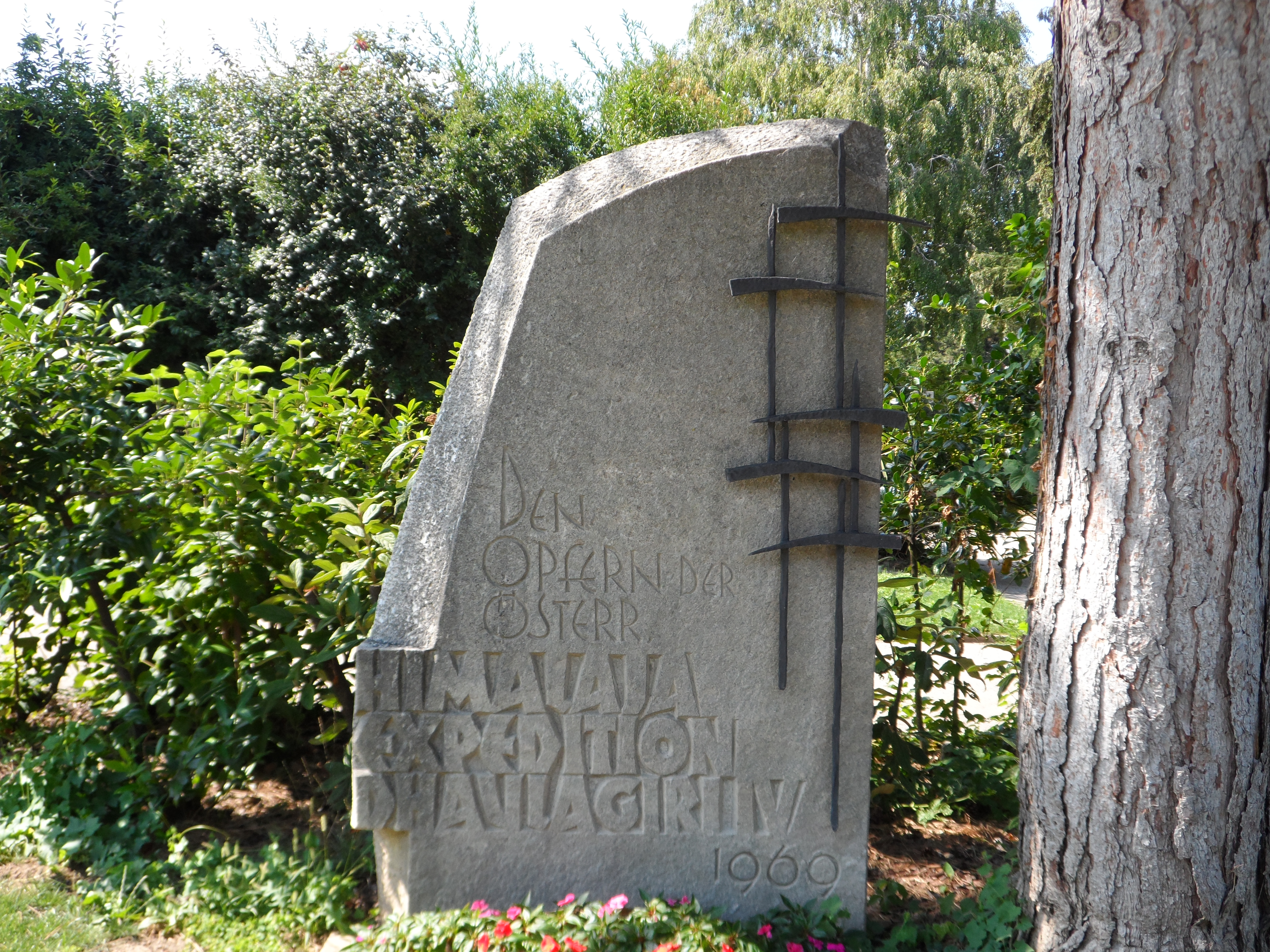 Gedenkstein für fünf Opfer der österreichischen Himalayaexpedition von 1969, die am 7.640 Meter hohen Dhaulagiri IV durch eine Lawine umkamen (Richard Hoyer, Peter Lavicka, Peter Nemec, Kurt Reha, Kurt Ring)